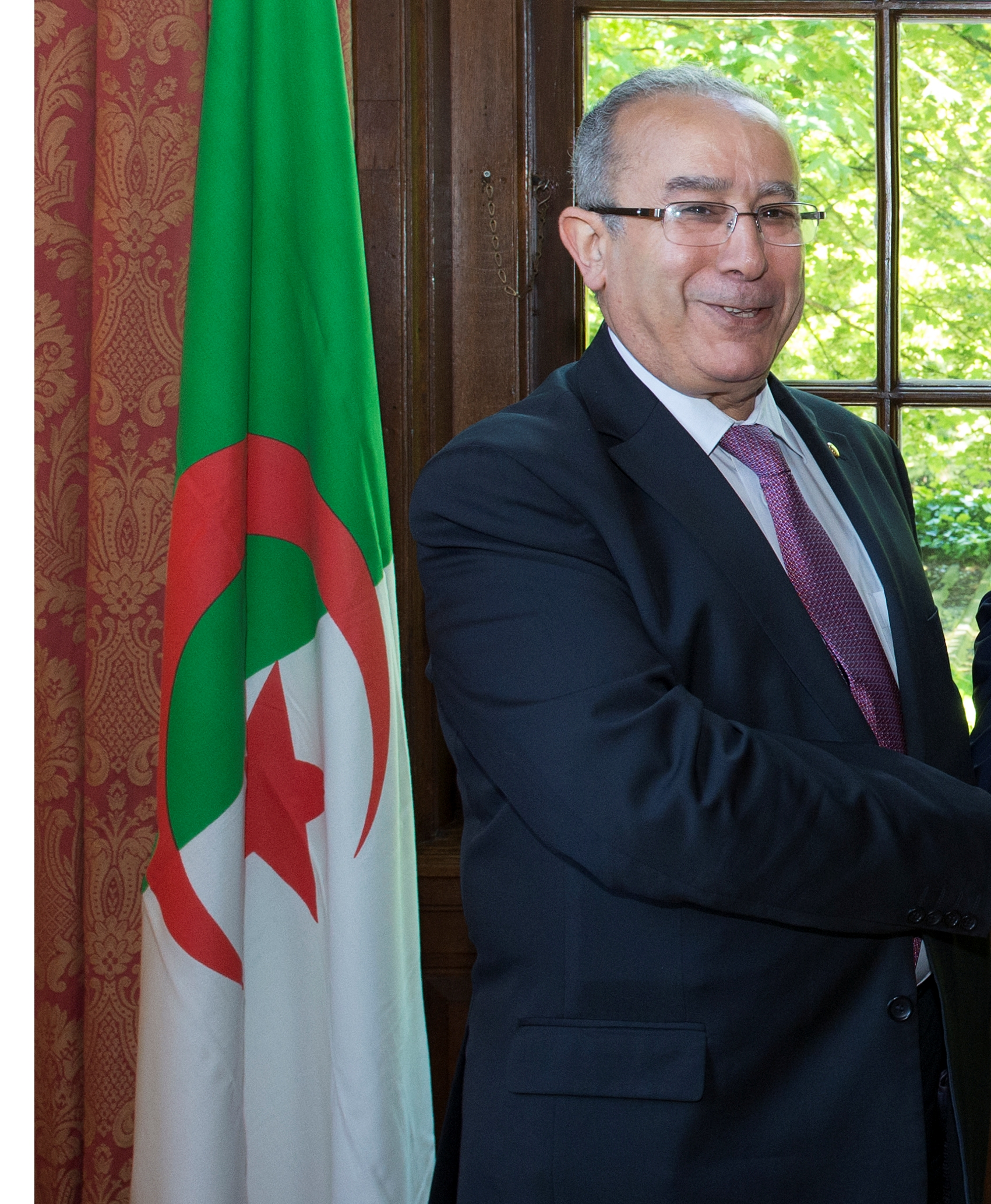 De minister van Buitenlandse Zaken van Algerije, Ramtane Lamanra, bezoekt Nederland ter bevordering van de betrekkingen. In Kasteel de Wittenburg spreekt hij met minister Timmermans.